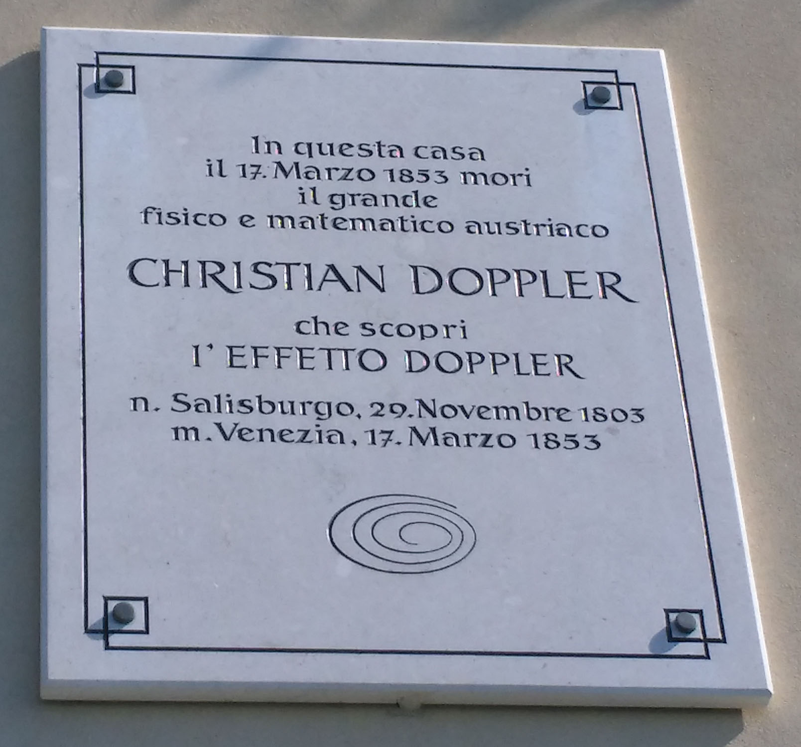 Gedenktafel an Christian Dopplers Sterbehaus in San Marco in Venedig.